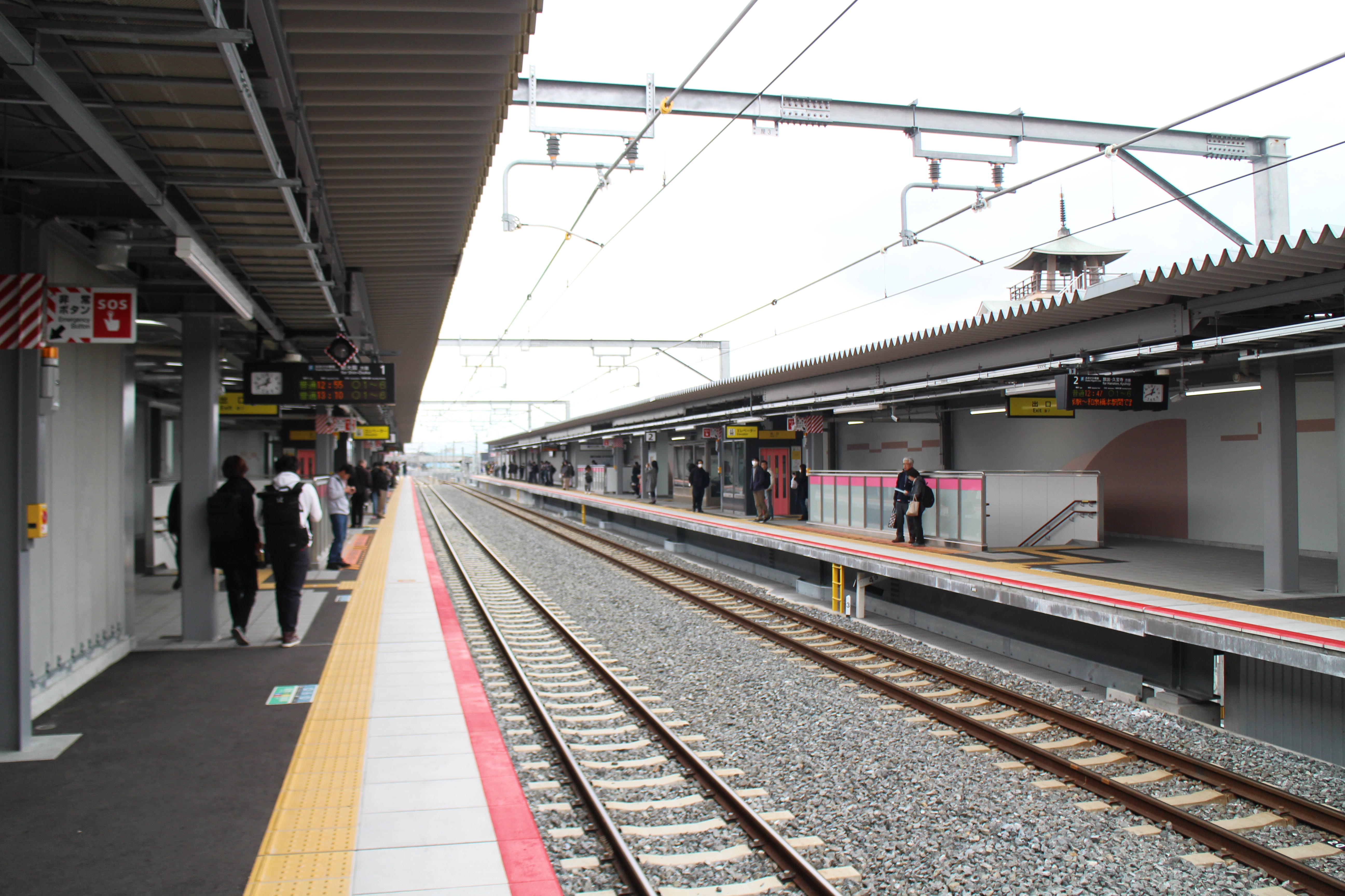 JR淡路駅ホーム